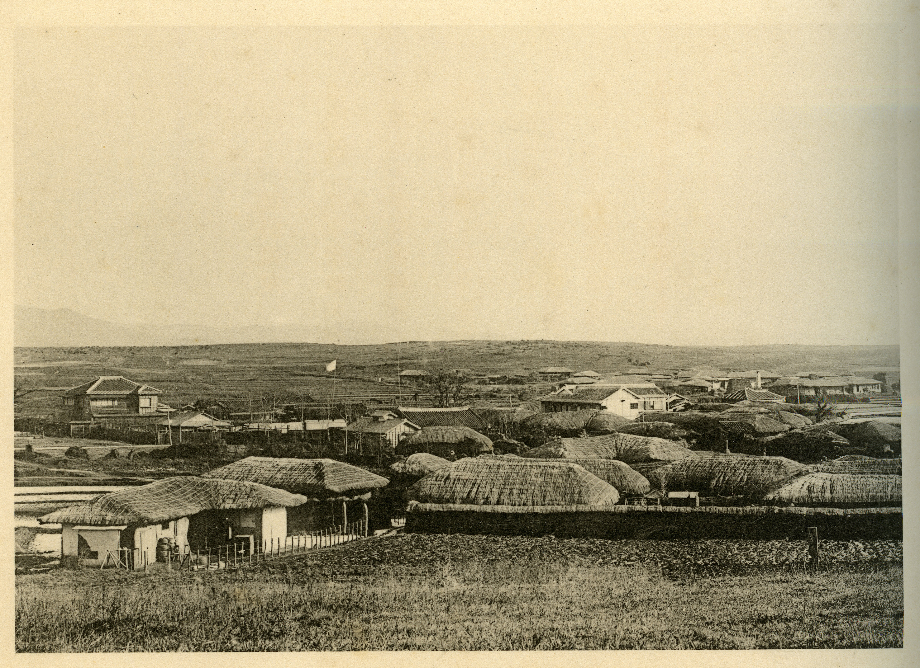 1912년 충남 아산시 온양온천, 장항선 개통은 1922년이다.